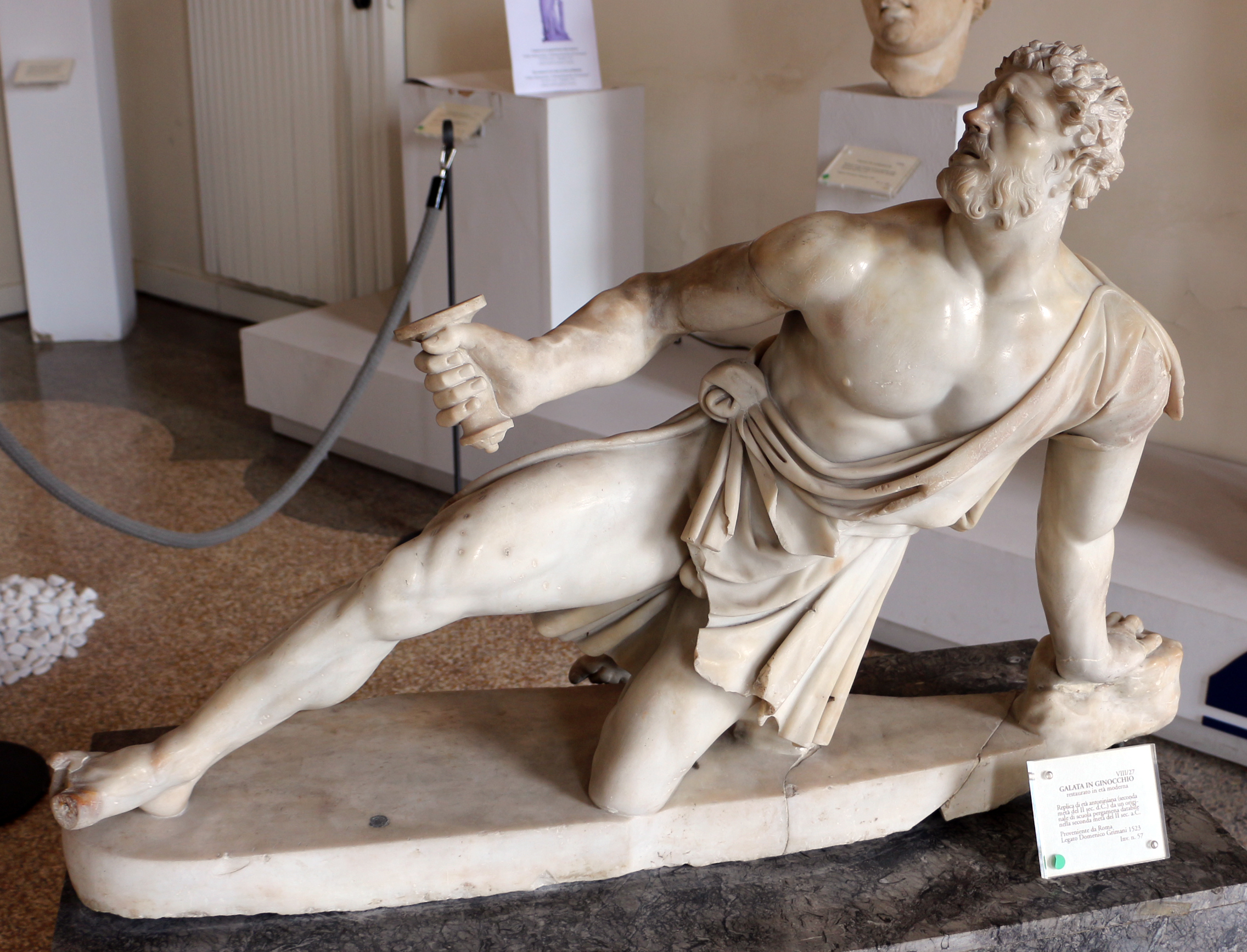 Museo Archeologico Nazionale This is a photo of a monument which is part of cultural heritage of Italy.